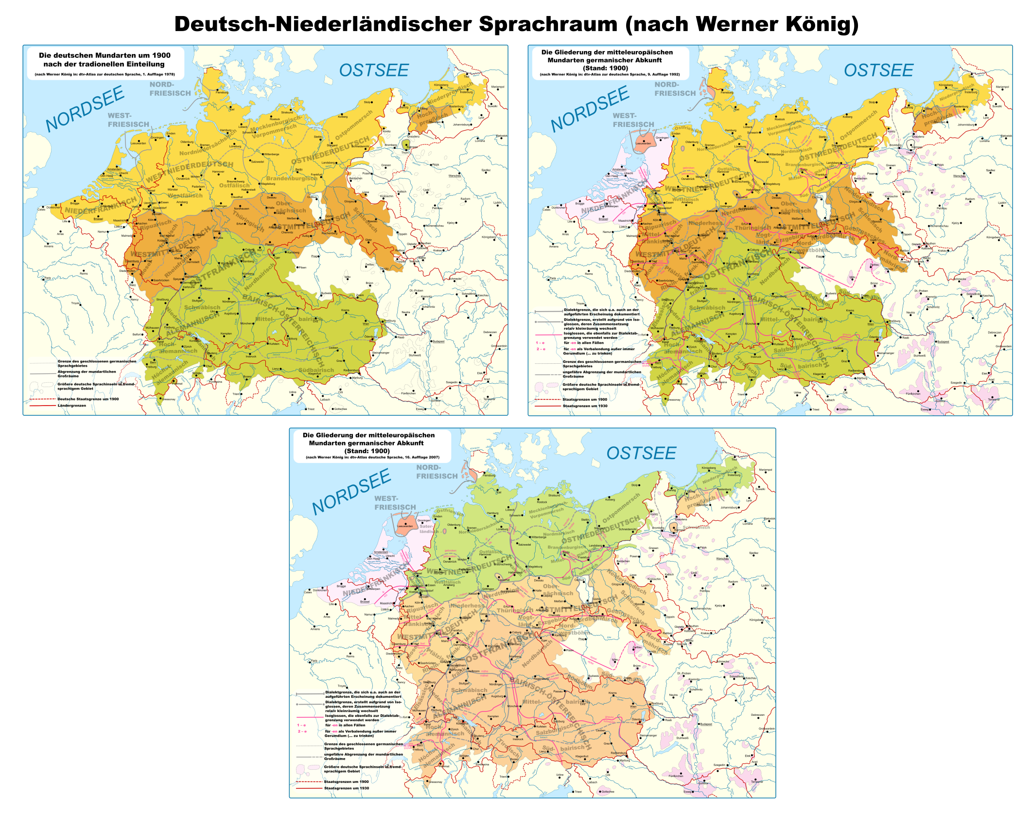 Beschreibung = Darstellungskarte des deutsch-niederländischen Sprachraumes nach Werner König.Legende: Niederdeutsch Ehemaliges niederdeutsches Sprachgebiet. Seit 1945/50 praktisch nicht mehr existent. Mitteldeutsch Ehemaliges mitteldeutsches Sprachgebiet. Seit 1945/50 nur noch wenige Sprecher, vor allem in der polnischen Wojwodschaft Oppeln. Oberdeutsch Ehemaliges oberdeutsches Sprachgebiet. Seit 1945/50 bis auf eine Sprachinsel in Fünfkirchen/Pécs in Ungarn nicht mehr existent. Niederfränkisch Friesisch Nummernschlüssel: 1 = Nordniedersächsisch 2 = Westfälisch 3 = Ostfälisch 4 = Mecklenburgisch-Vorpommsch 5 = Märkisch-Brandenburgisch 6 = Ostpommersch 7 = Niederpreußisch 8 = Gronings 9 = Drents 10 = Gelders-Overĳssel 11 = Twents 12 = Niederrheinisch 13 = Limburgisch 14 = Zuid-Gelders 15 = Utrechts-Ablasserwaards 16 = Hollands 17 = Brabants 18 = Zeeuws 19 = Oost-Vlaams 20 = West-Vlaams 21 = Ripuarisch 22 = Moselfränkisch 23 = Hessisch 24 = Pfälzisch 25 = Thüringisch 26 = Obersächsisch27 = Lausitzisch-Schlesisch 28 = Hochpreußisch 29 = Ostfränkisch 30 = Südrheinfränkisch 31 = Bairisch-Österreichisch 32 = Schwäbisch-Alemannisch 33 = Westfriesisch 34 = Saterfriesisch 35 = Nordfriesisch Folgende Zahlen lassen sich zu folgenden Grußgruppen summieren: 1, 2 3, 8, 9, 10 und 11 = Westniederdeutsch 4, 5, 6, 7 = Ostniederdeutsch 18, 19 und 20 = Flämisch-Seeländisch 15, 16 = Holländisch 12 und 17 = Brabantisch-Kleverländisch 21 und 22 = Mittelfränkisch 23 und 24 = Rheinfränkisch 25 und 26 = Thüringisch-Obersächsisch. Die gepunktete Linie stellt die deutsche Ostgrenze und die Grenze der Freien Stadt Danzig dar, wie sie am 31. Dez. 1937 bestanden. (Quelle: Werner König: „dtv-Atlas zur deutschen Sprache“, 9. Auflage Aug. 1992, S. 230/231)